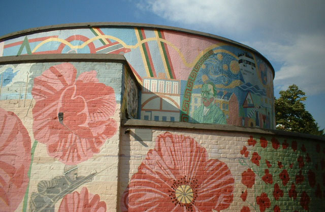 Stockwell deep level shelter. Taken by C Ford september 2003.